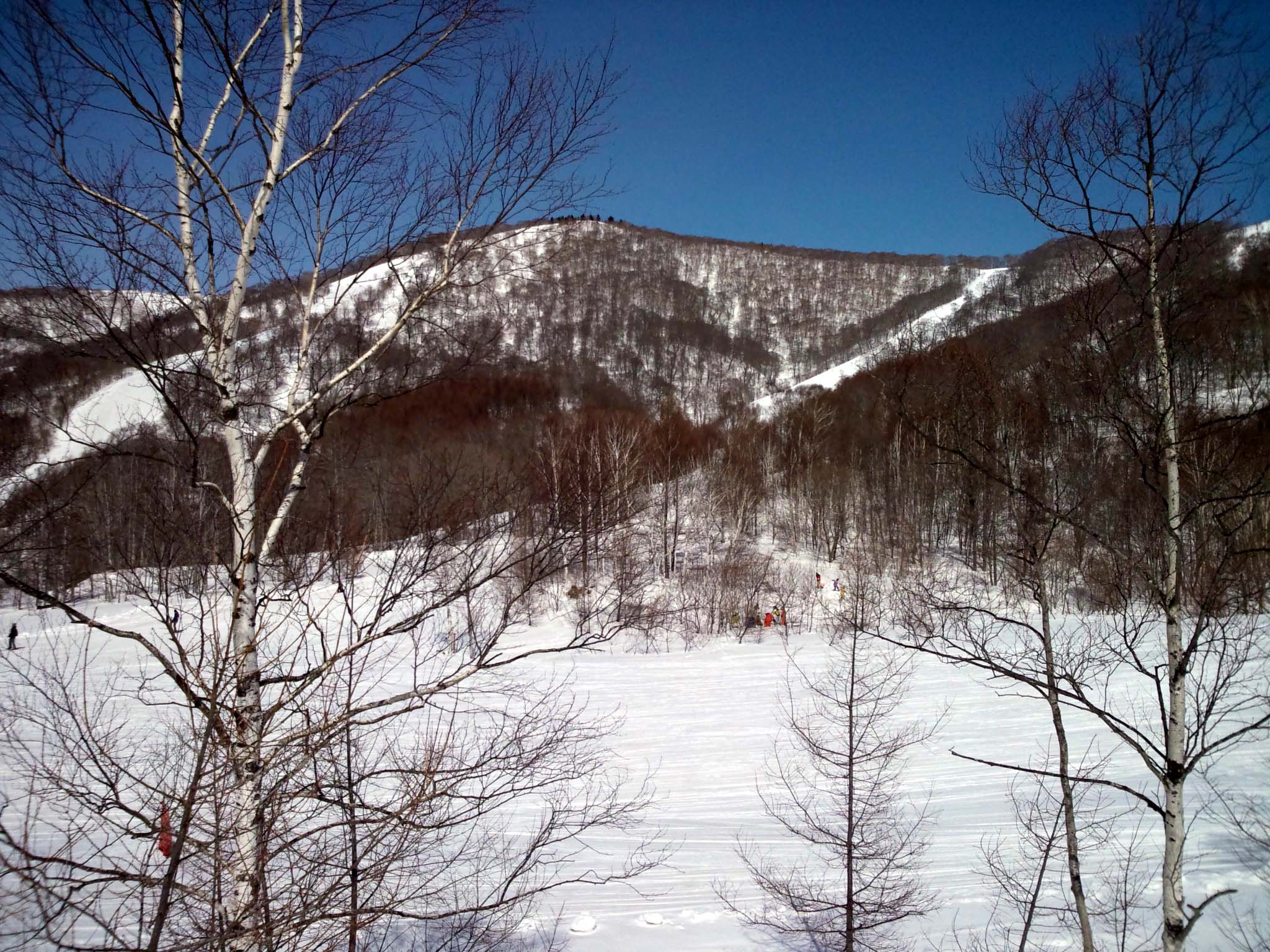 尾瀬岩鞍西山ゲレンデ 私のスマートフォン F-12Cにて撮影